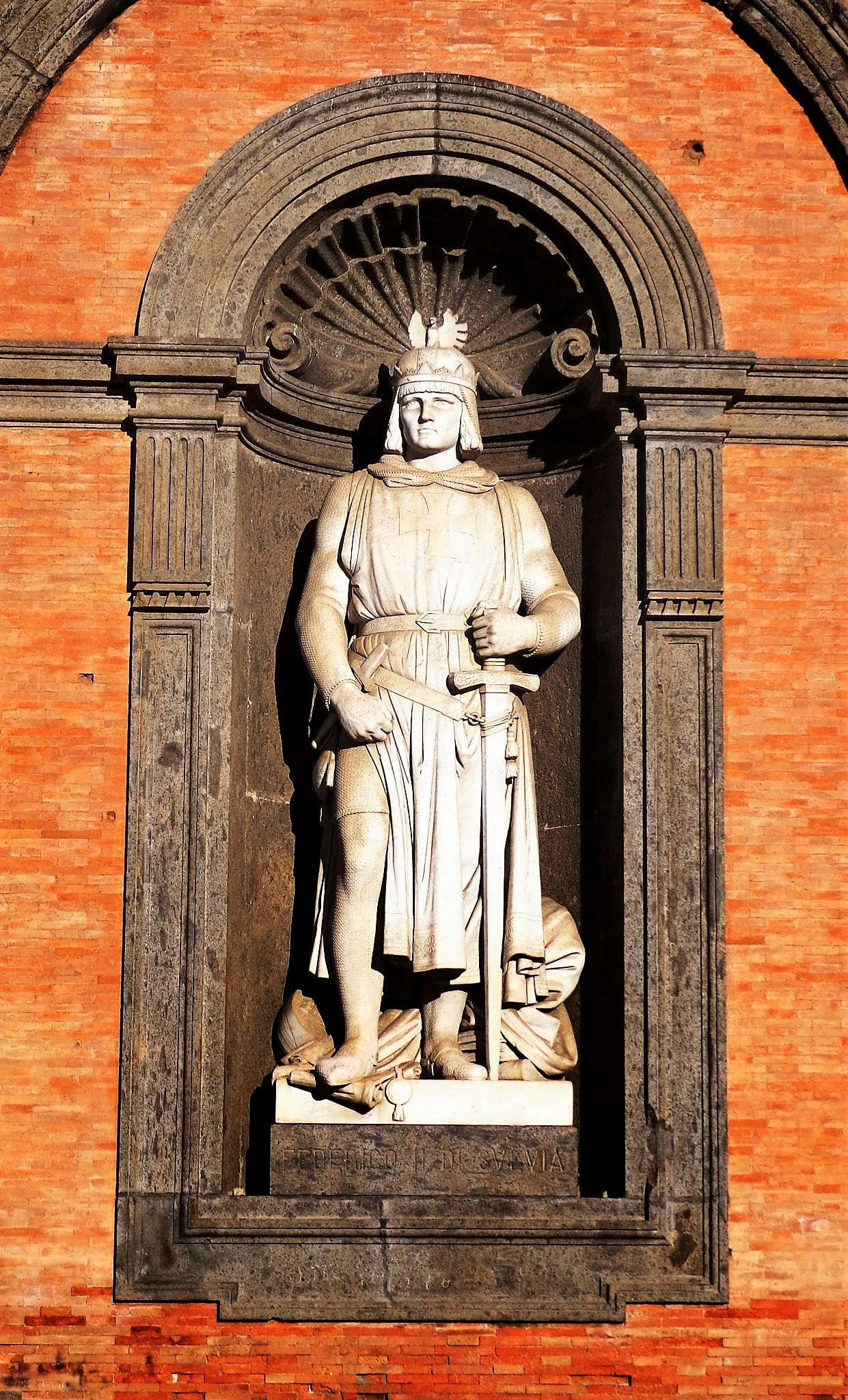 Statua di Federico II di Svevia